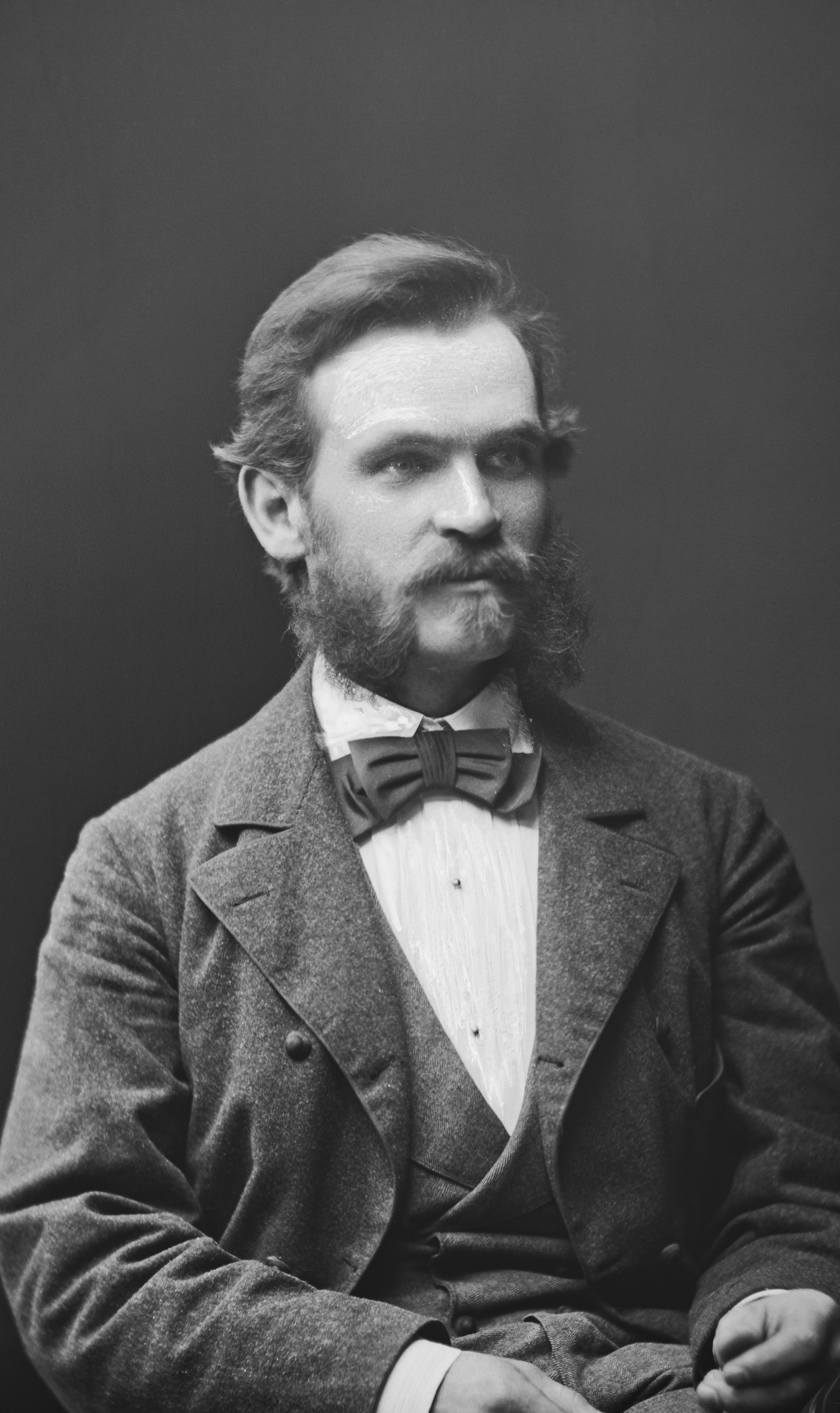 Matti Äyräpää (ent. Europaeus), tuleva lääkäri ja hammaslääketieteen uraauurtava tutkija